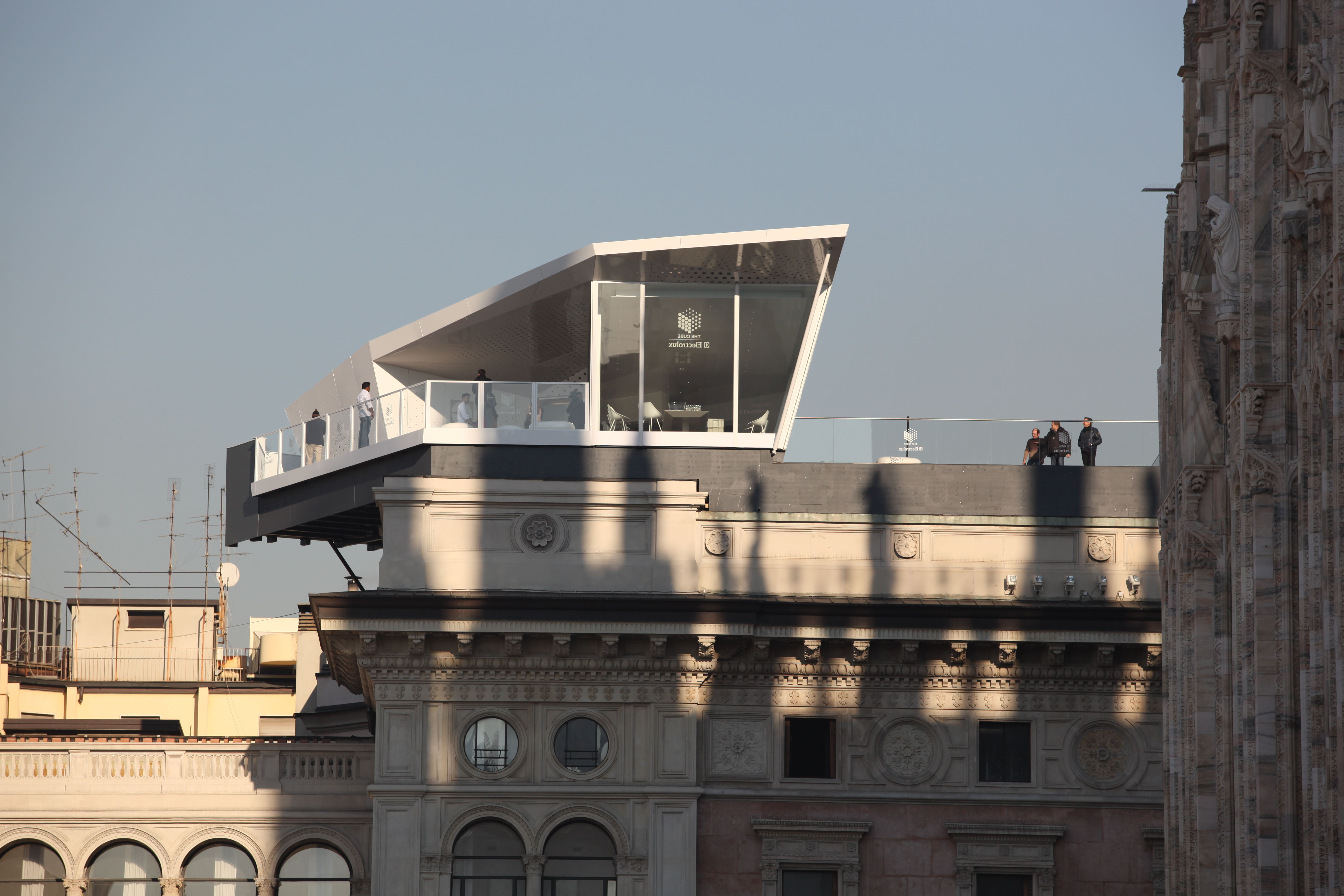 Affacciato su Piazza del Duomo, il cuore culturale e sociale di Milano, The Cube by Electrolux consentirà ad alcuni tra i più famosi Chef italiani, che già lavorano con Electrolux nel loro ristorante, di abbinare la loro cucina stellata con il design più innovativo e un panorama mozzafiato. Con soli 18 posti, è un'esperienza gastronomica da non perdere per gli appassionati di alta cucina.